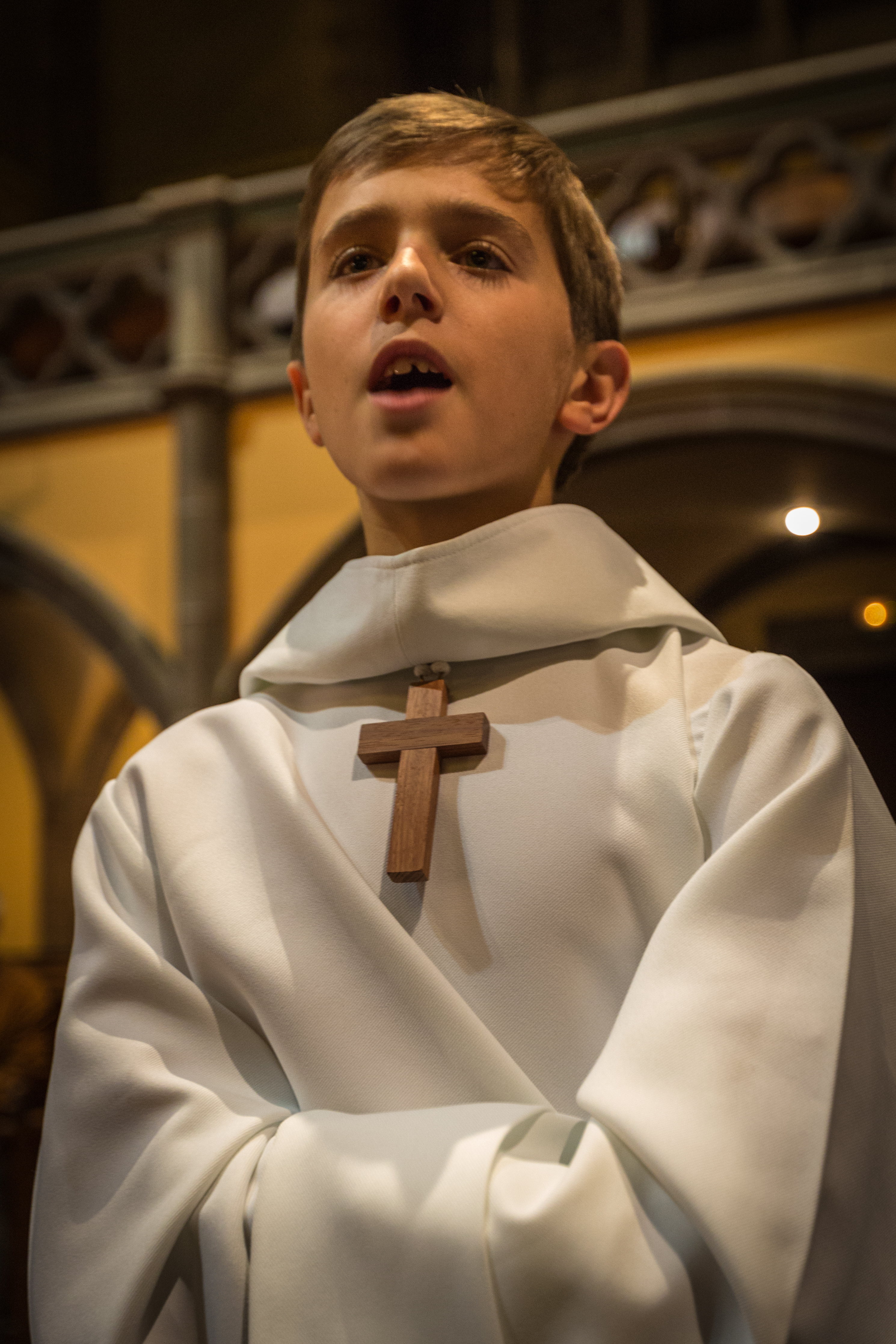 La Manécanterie des Petits Chanteurs à la Croix de Bois en concert à l’église Saint-Paul de Strasbourg pour un concert organisé par la l’Ordre international des Anysetiers, chapitre de Strasbourg, au profit de l’association Semeurs d’Étoiles' le 9 novembre 2013.